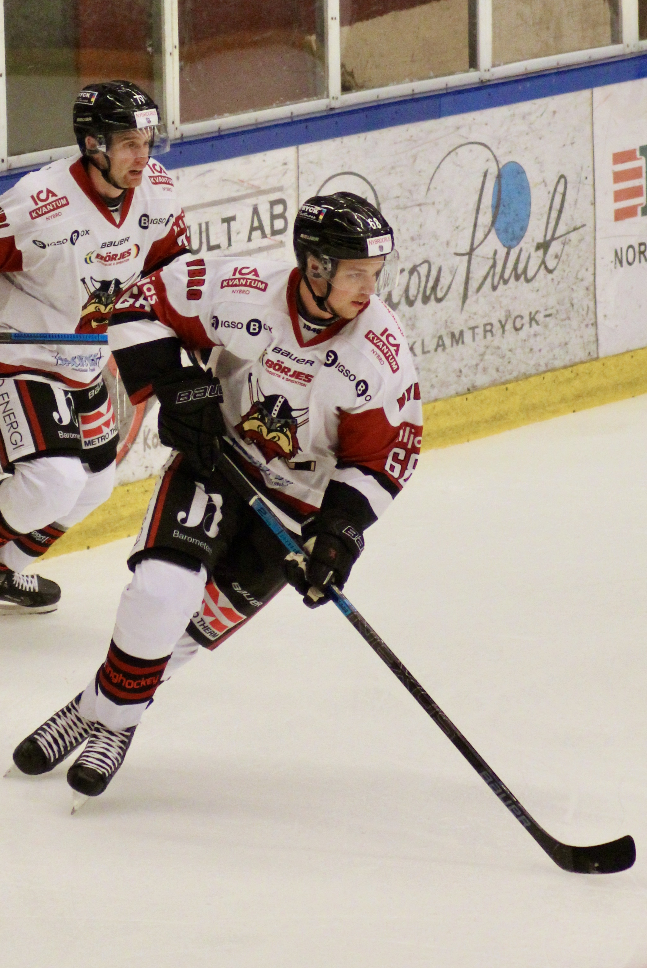 Matchinfo